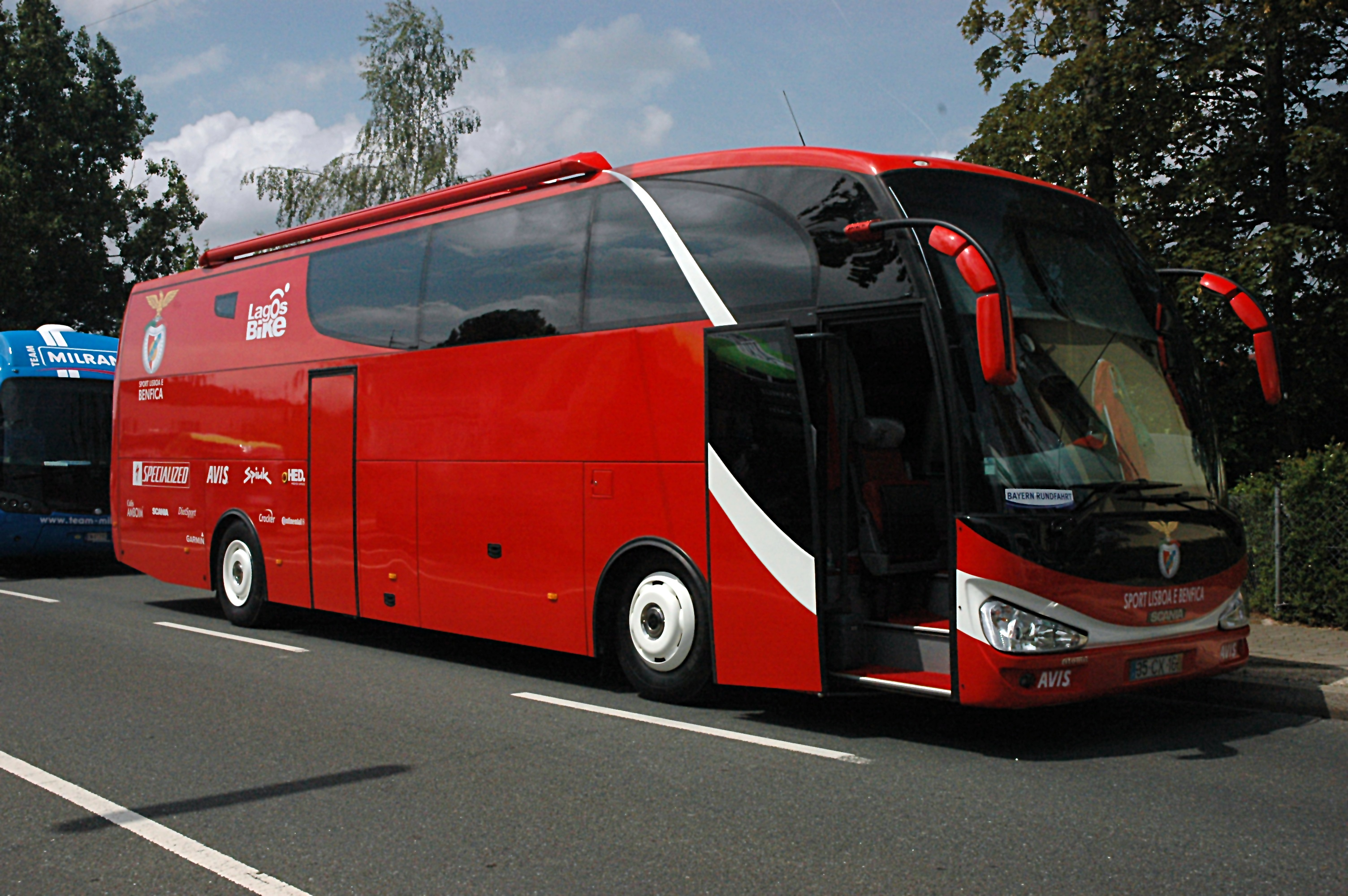 Teambus des Team Benfica bei der Bayern Rundfahrt 2007.